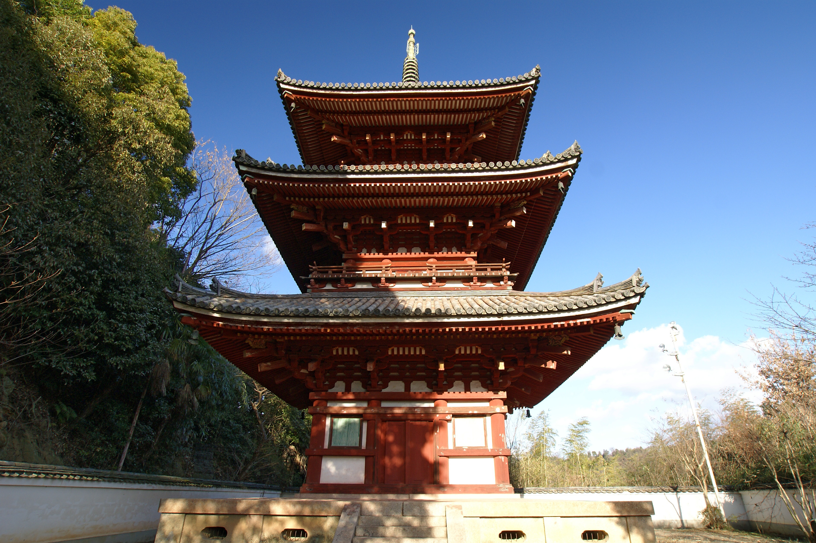 Saikokuji in Onomichi, Hiroshima prefecture, Japan